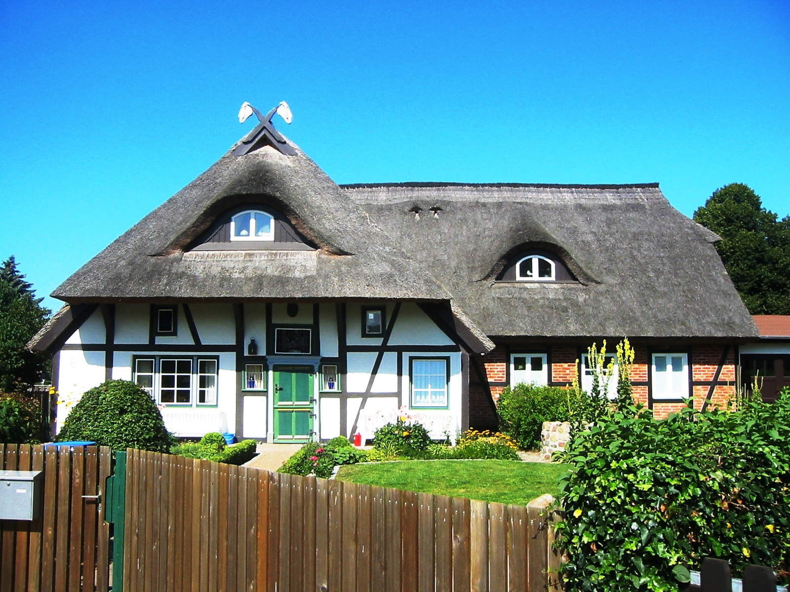 Storchenhaus in der Parkstraße 6 in Wustrow (Fischland). Hier war die Künstlerin Hedwig Woermann zu Hause